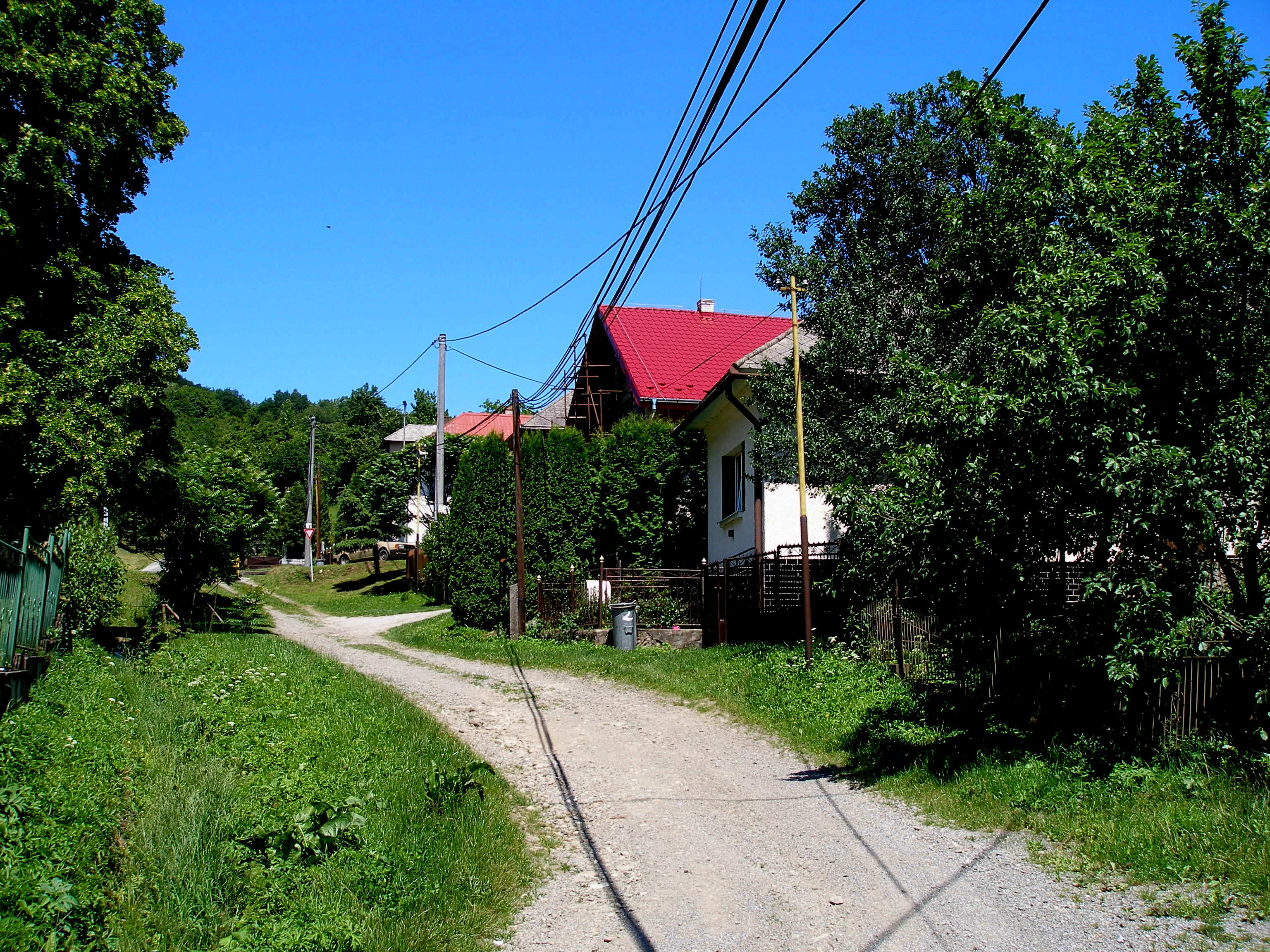 Obec Ratvaj okres Sabinov